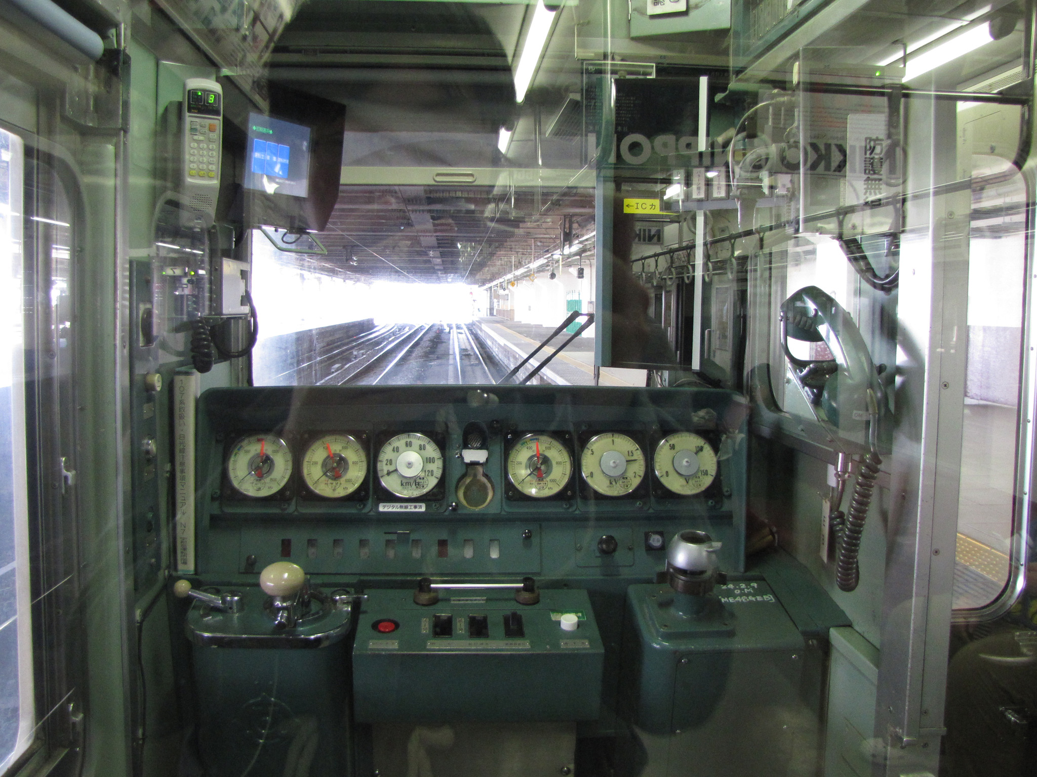 JR東日本107系電車 運転台（クハ106-7）